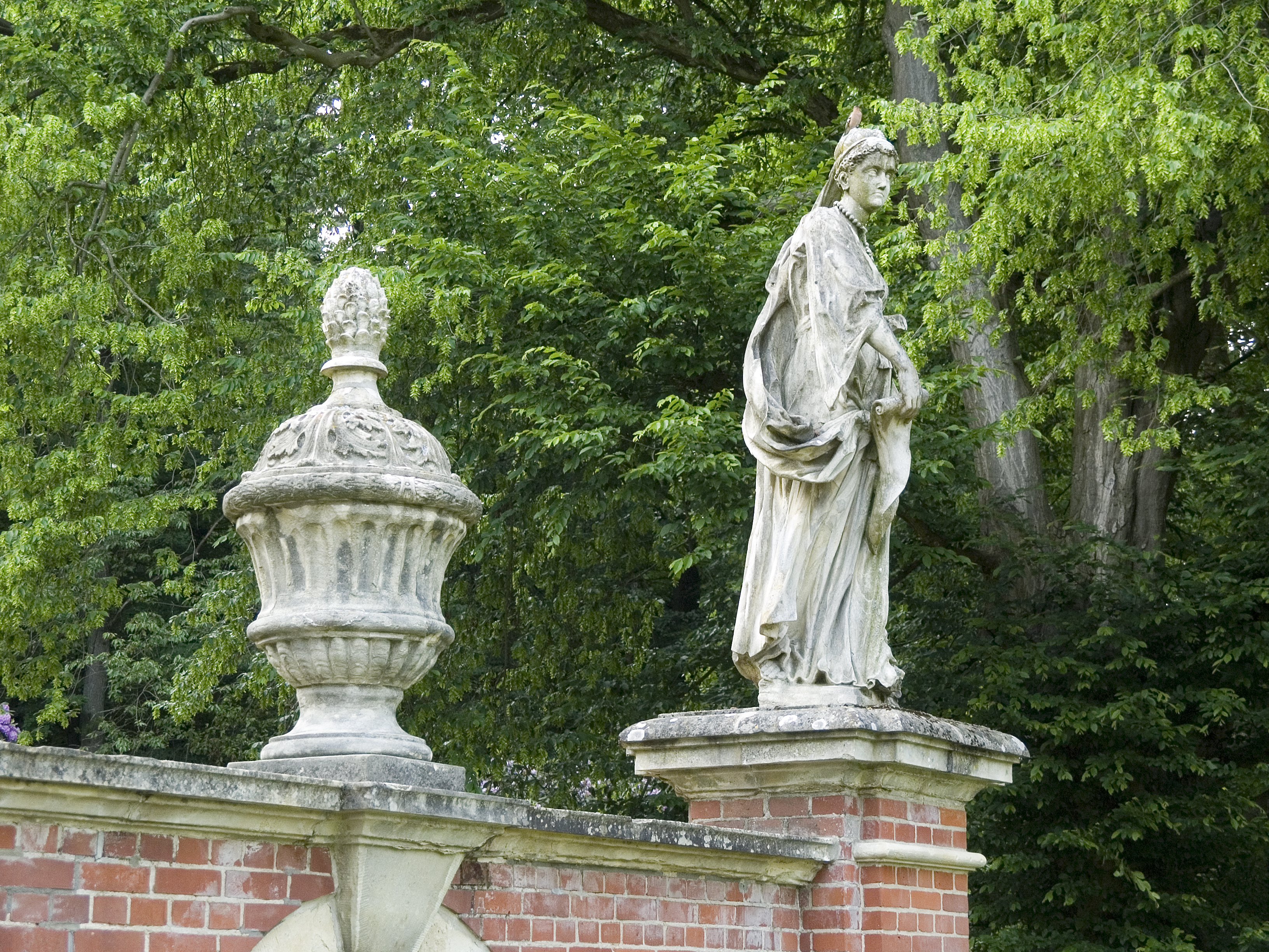 Северный Рейн-Вестфалия, Дорстен - Замок Лембек